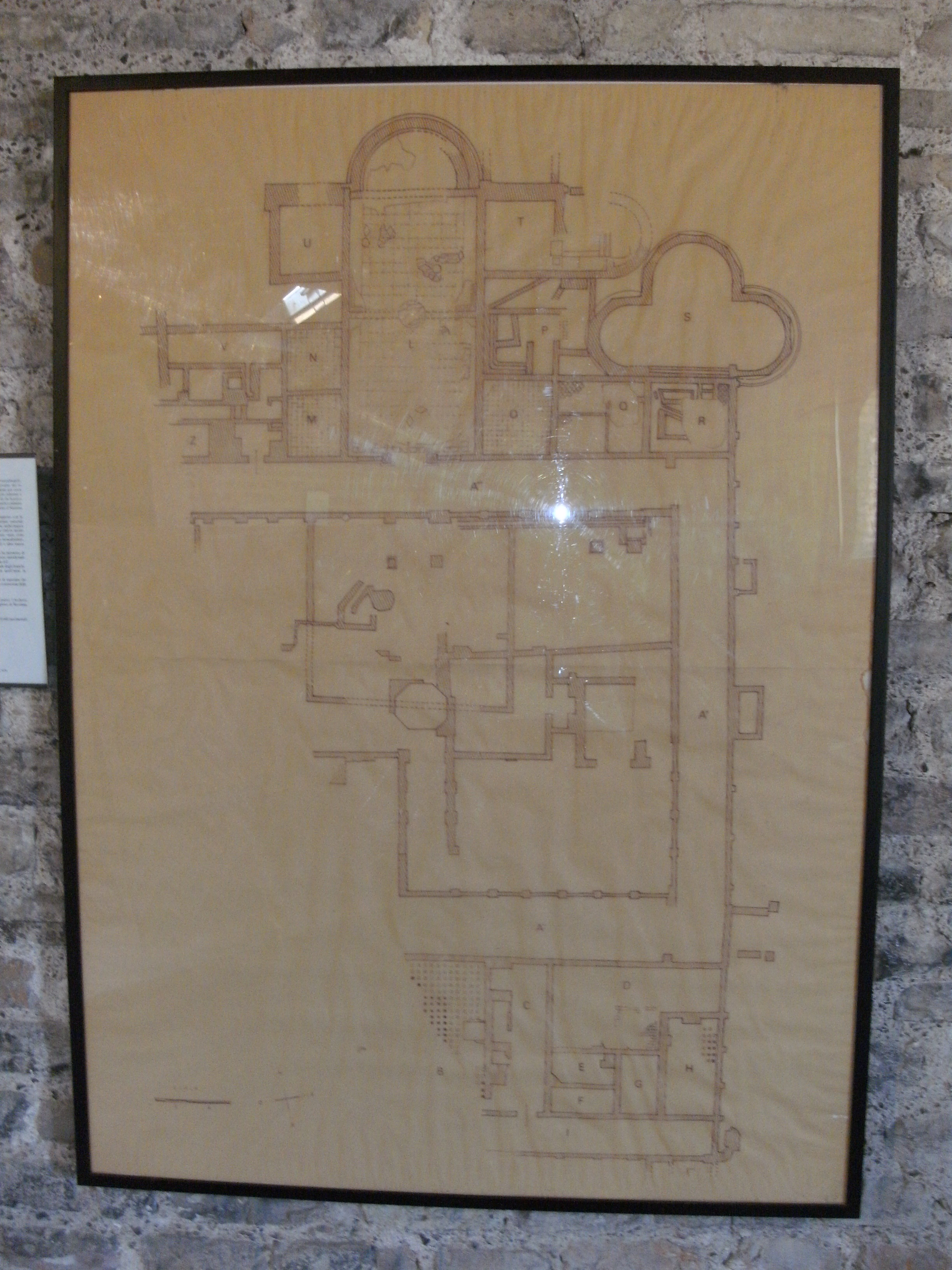 Ravenna, sogenannter Palast des Theoderich, dort ausgestellte Skizze der bei den Ausgrabungen von 1907-1911 freigelegten Fundamente und Mauerreste des Palasts Theoderichs d. Gr.